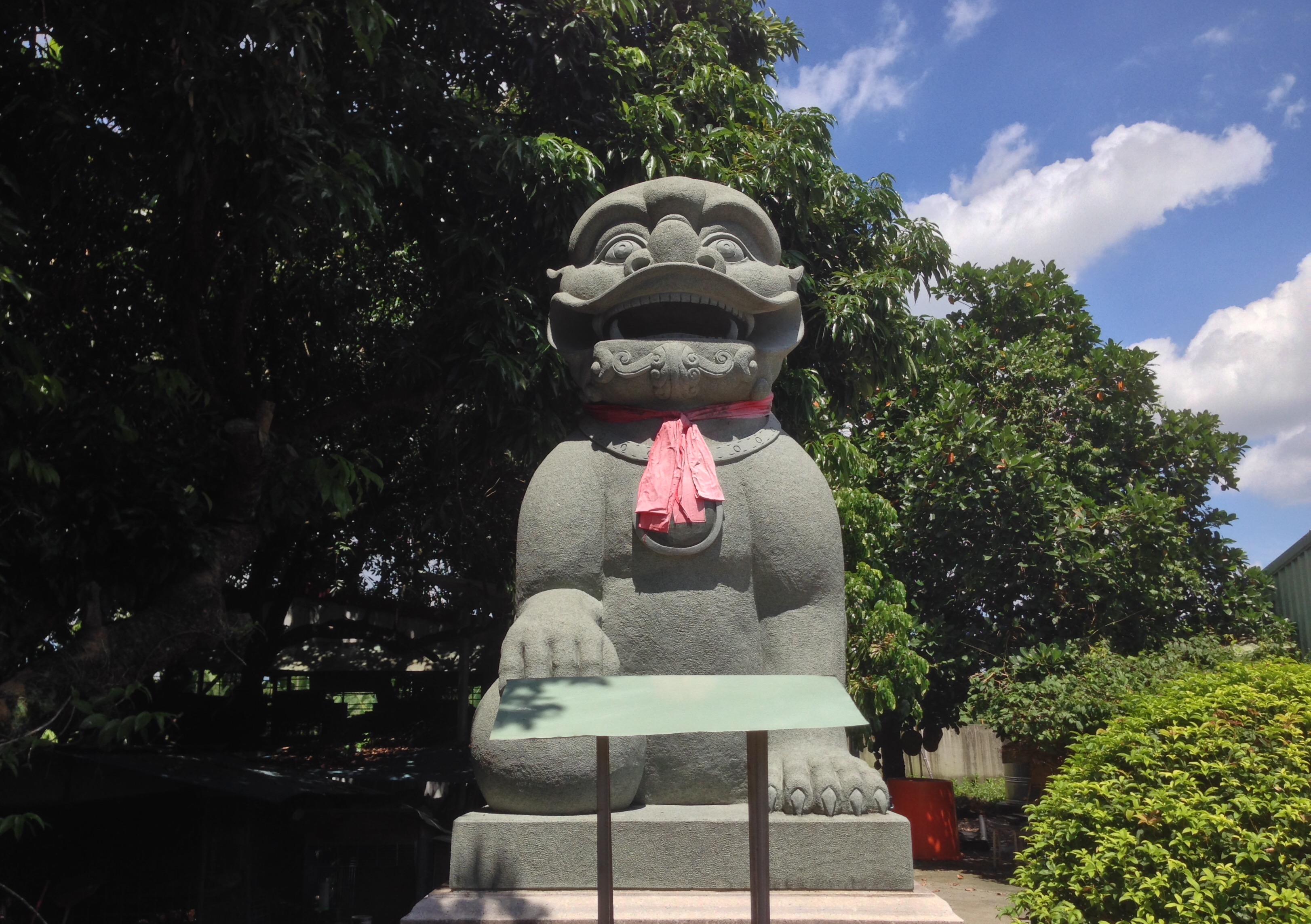 中文（台灣）: 獅老四正面